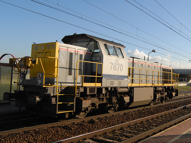 Locomotief 7870 rijdt los door het station Antwerpen-Noorderdokken